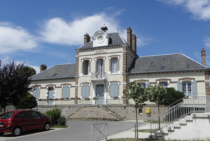 Mairie de Courlon-sur-Yonne (89).